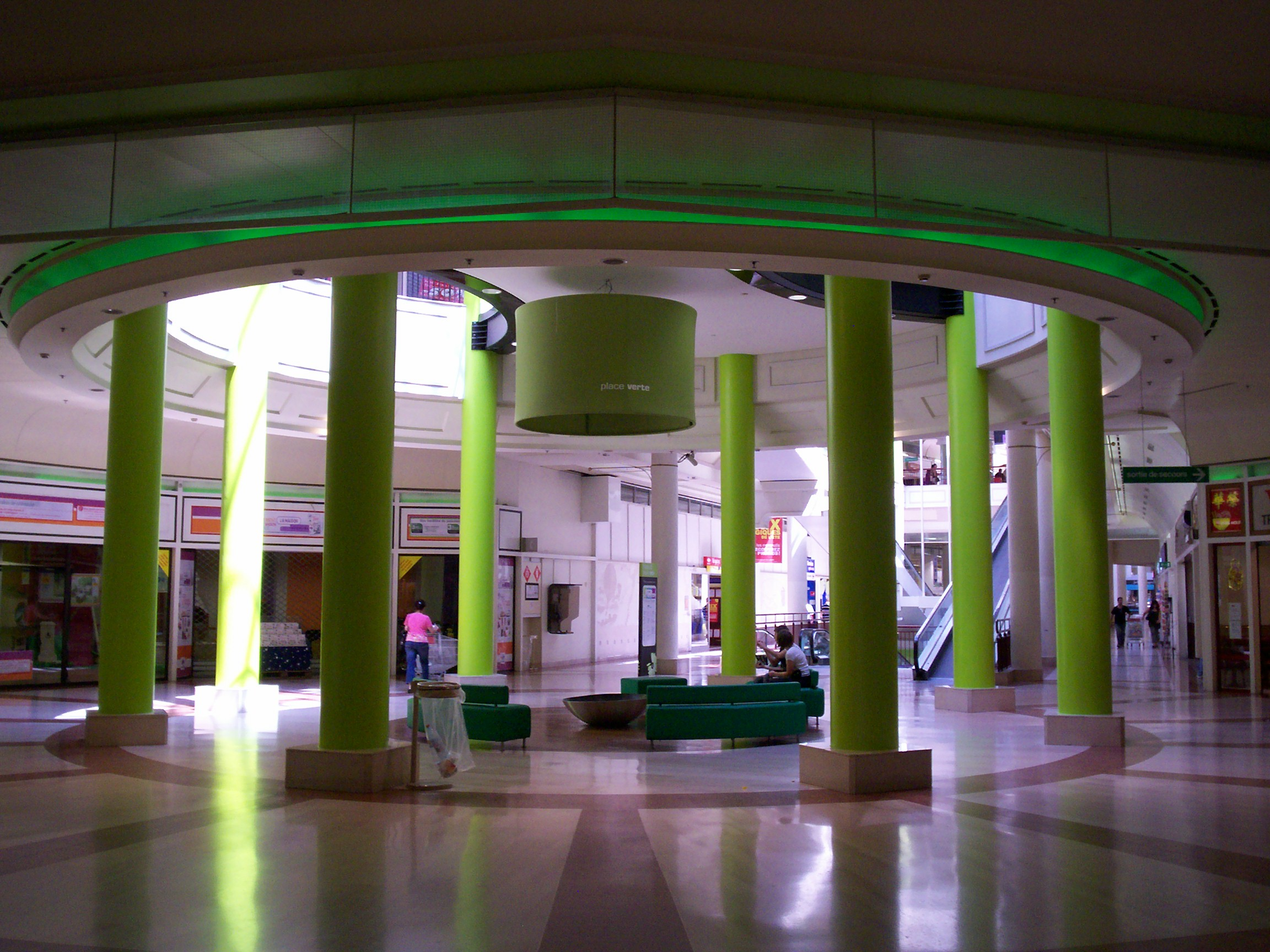 Porte Verte de Chelles2 au niveau 0